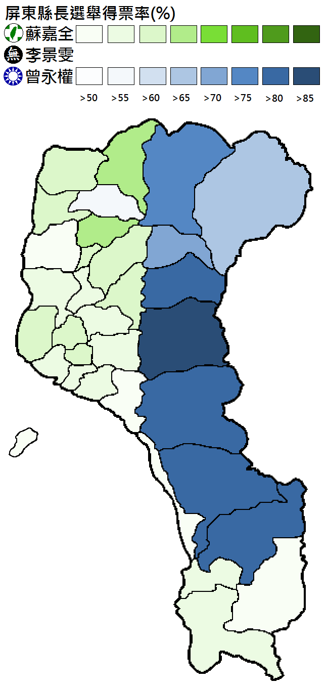 1997年屏東縣長選舉